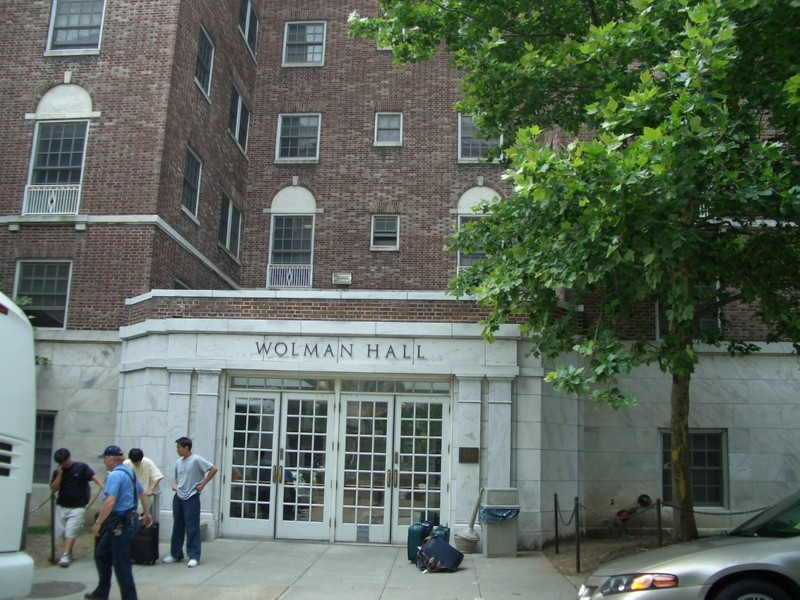 Wolman Hall